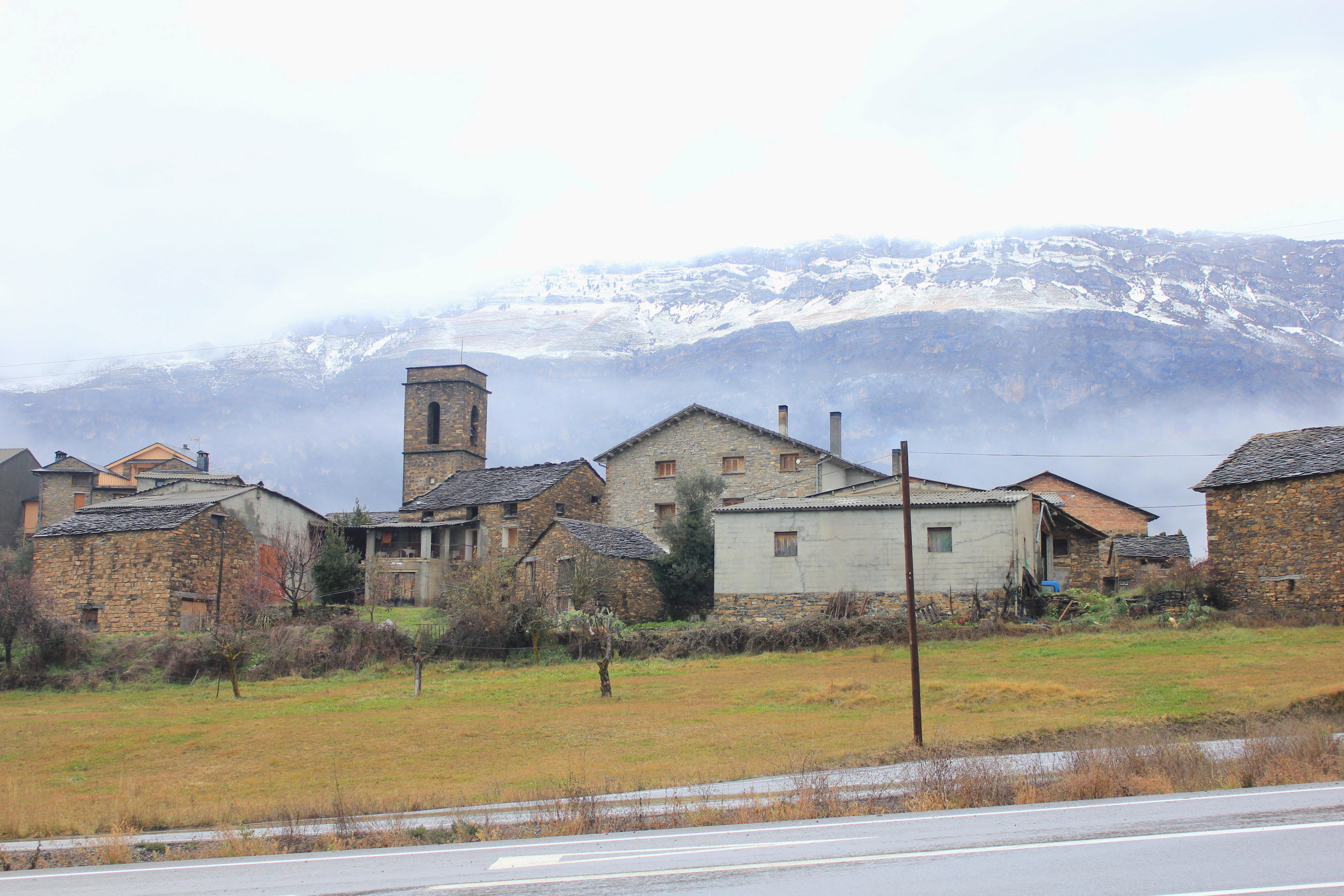 Aragonés: Anvista de Sant Per (A Fueva) dende a carretera nacional N-260.